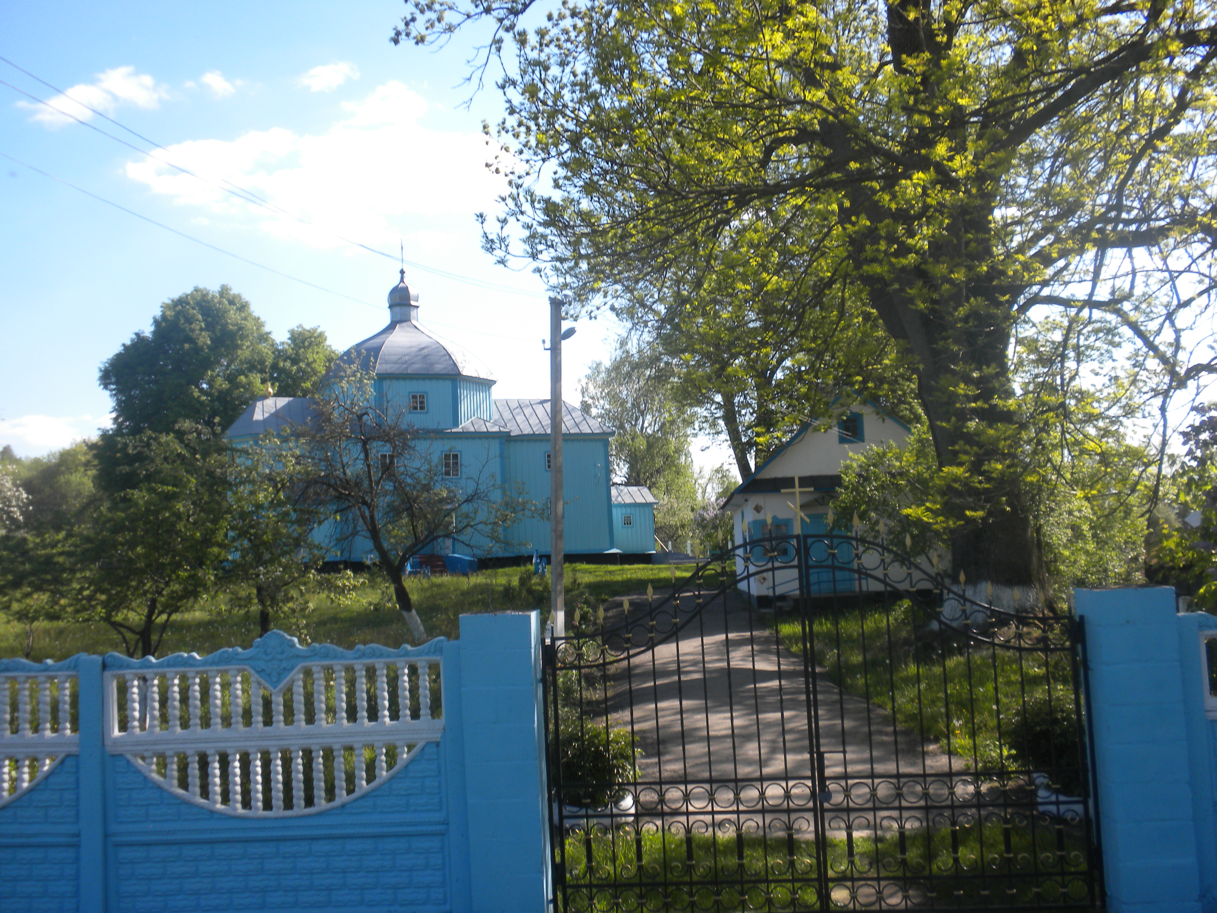 Дерев'яний храм Покрови Богородиці